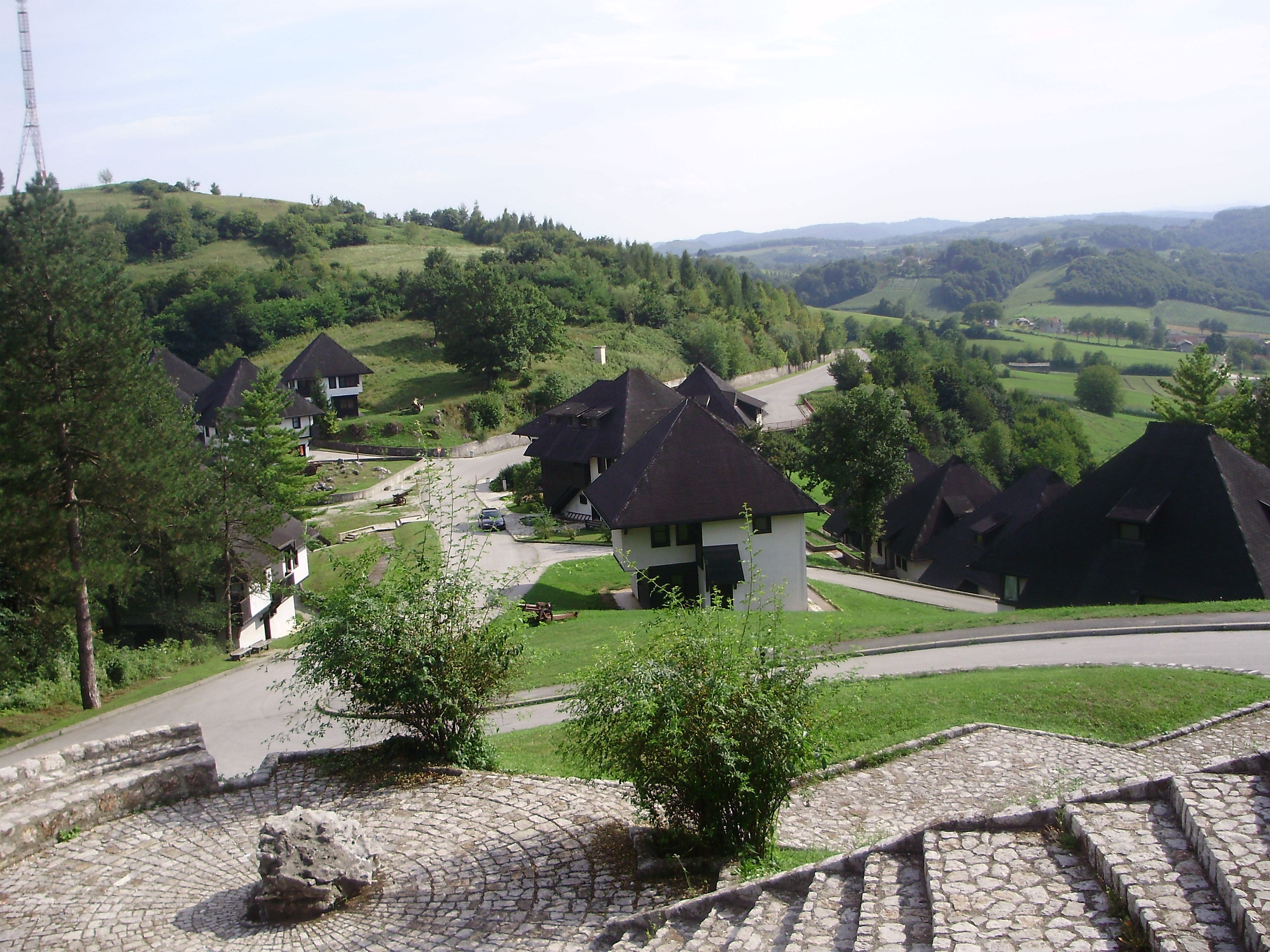 Stari grad u Velikoj Kladuši